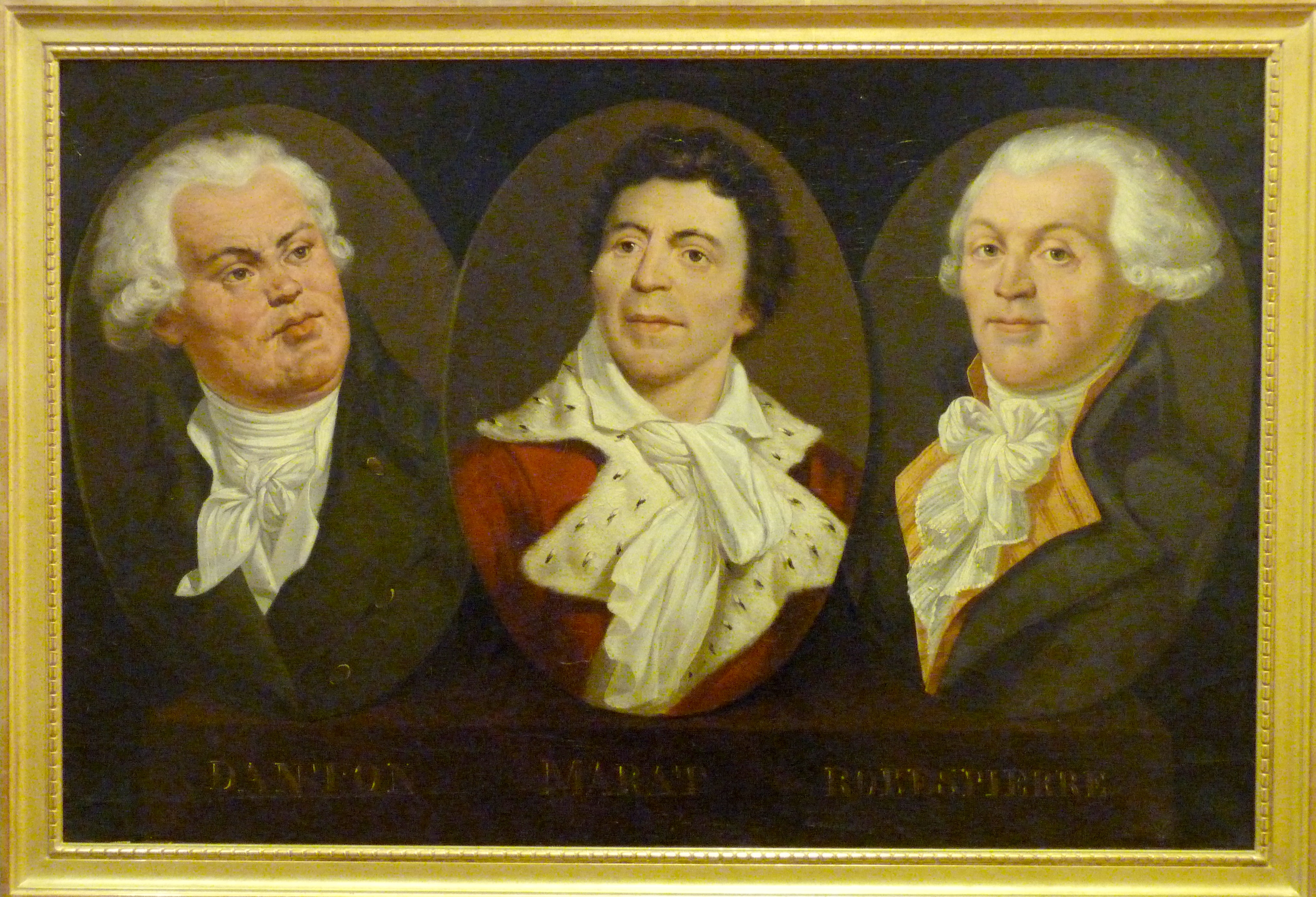 Danton, Marat, Robespierre, huile sur toile, anonyme, école française du XVIIIe siècle. Musée Lambinet n° Inv. 765